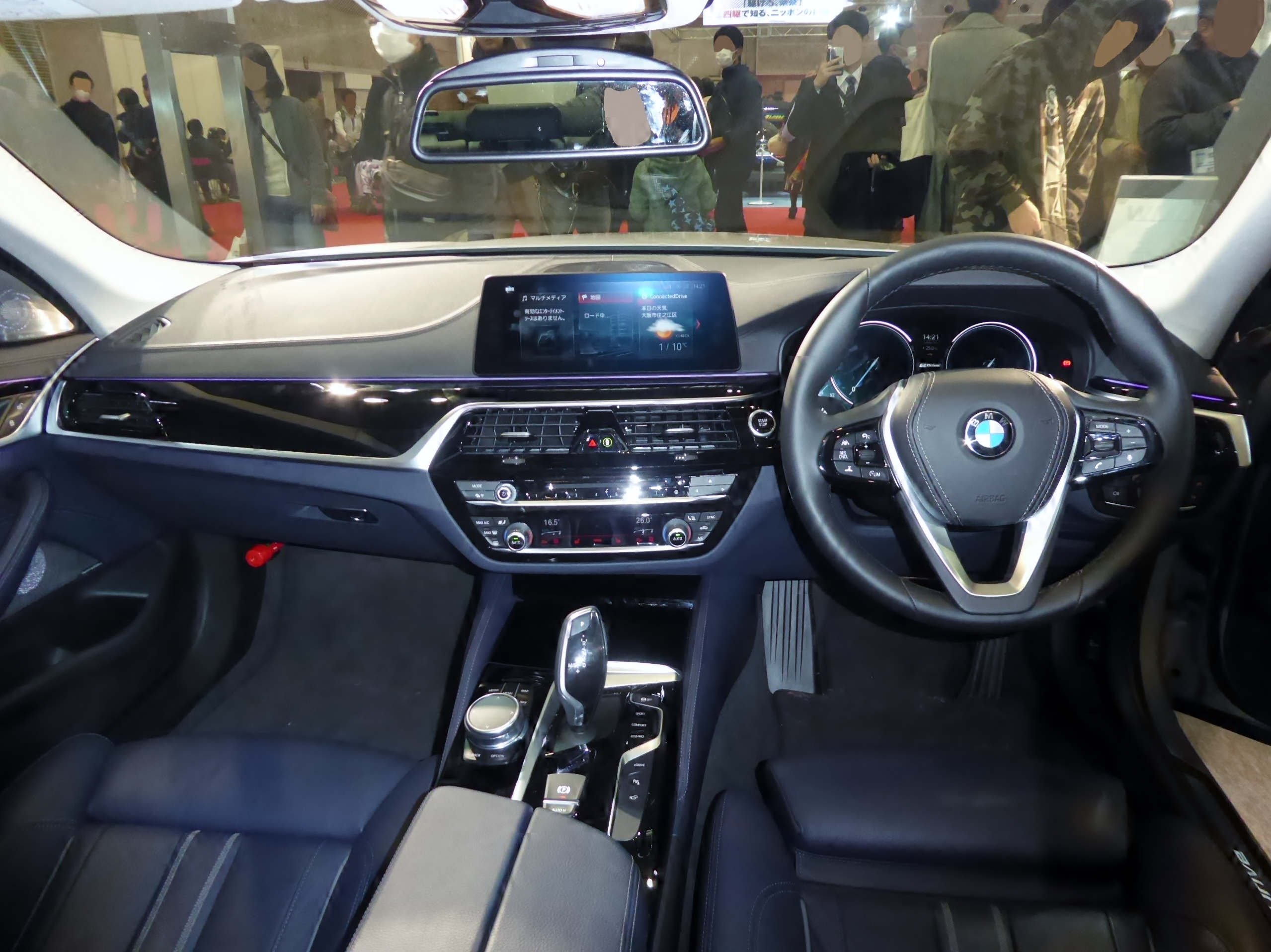 大阪モーターショー2017に於いてG30系BMW・530e iPerformance Luxuryを撮影。